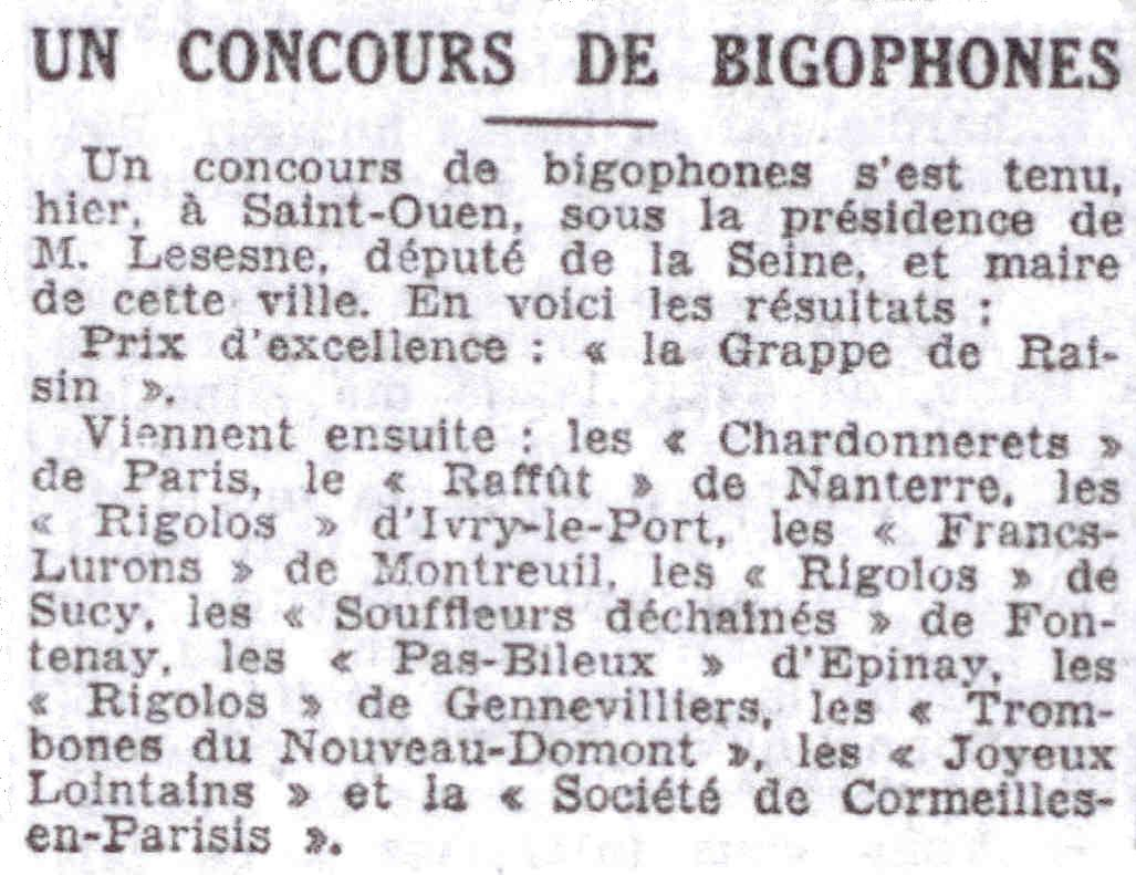 Compte-rendu d'un concours de bigotphones le 7 juin 1931 ; Le Petit Parisien, page 3, 4ème colonne.